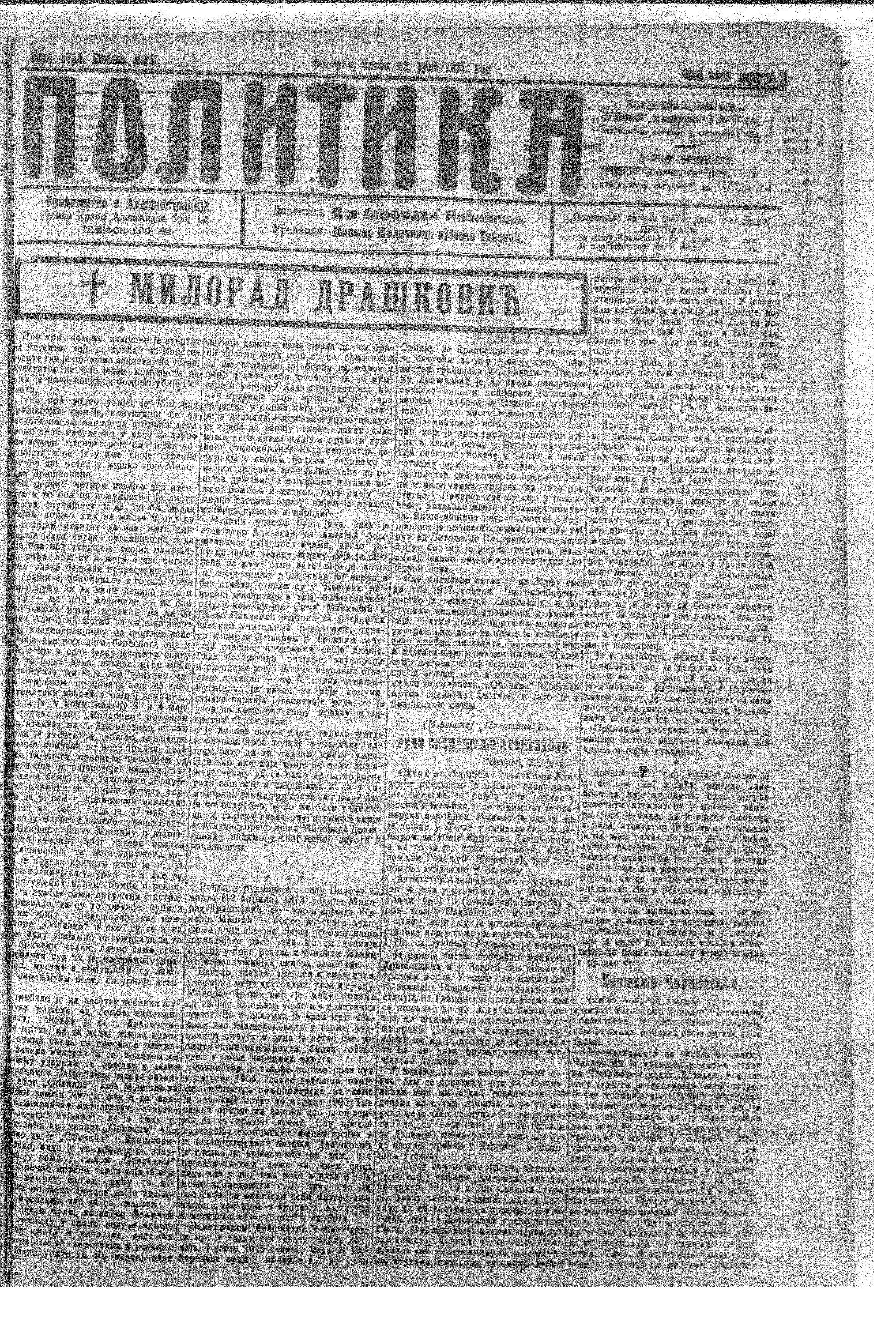 Srpskohrvatski / српскохрватски: Politika od 22. 07. 1921 sa naslovnicom o atentatu na ministra policije Milorada Draškovića